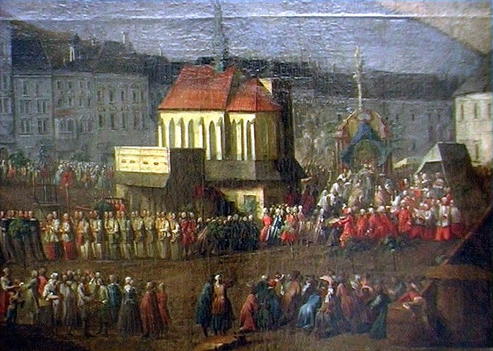 Brněnský Dolní trh (dnes náměstí Svobody) a kostel svatého Mikuláše